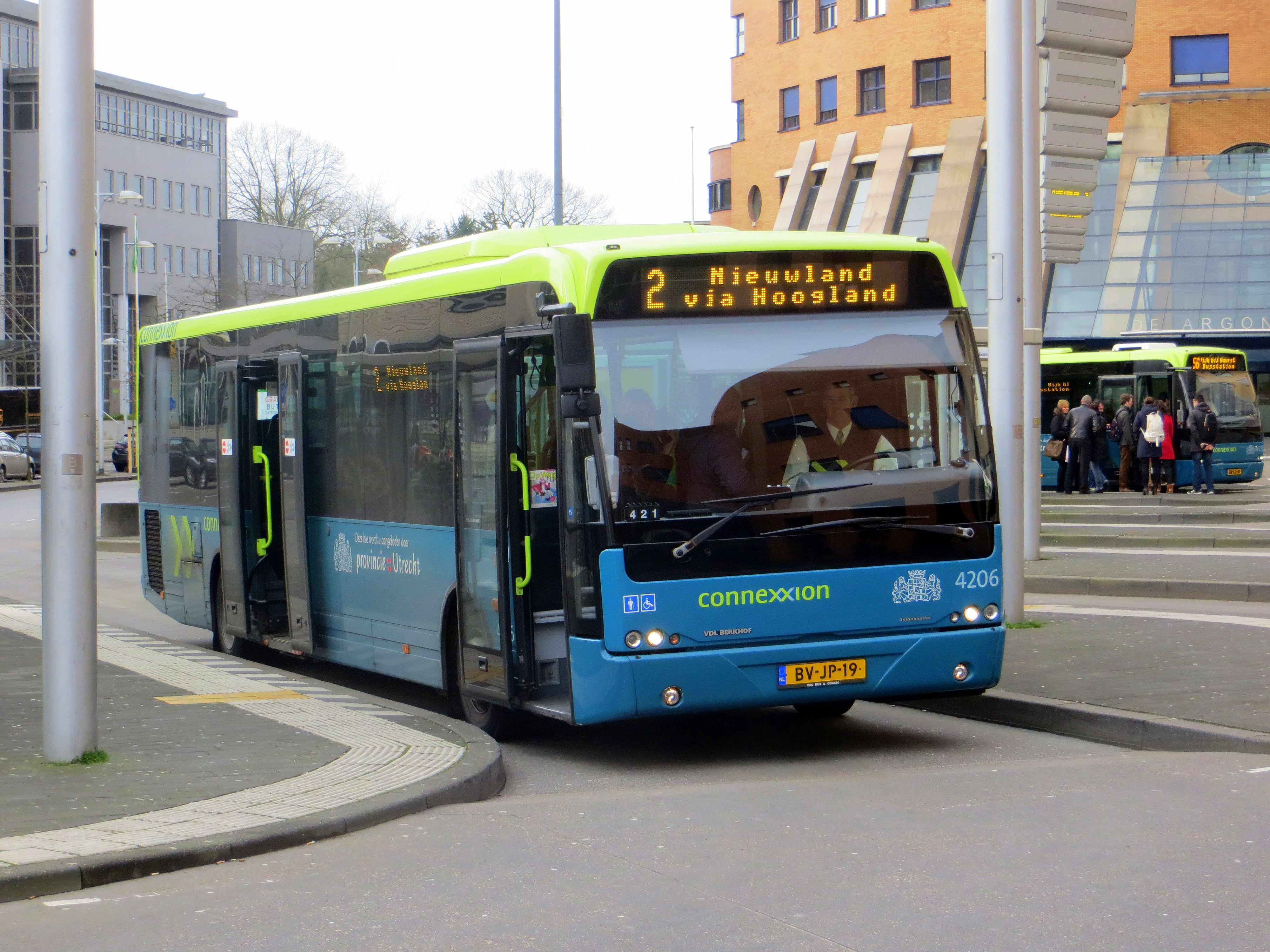 VDL Berkhof Ambassador 200 Stadsdienst Amersfoort lijn 2